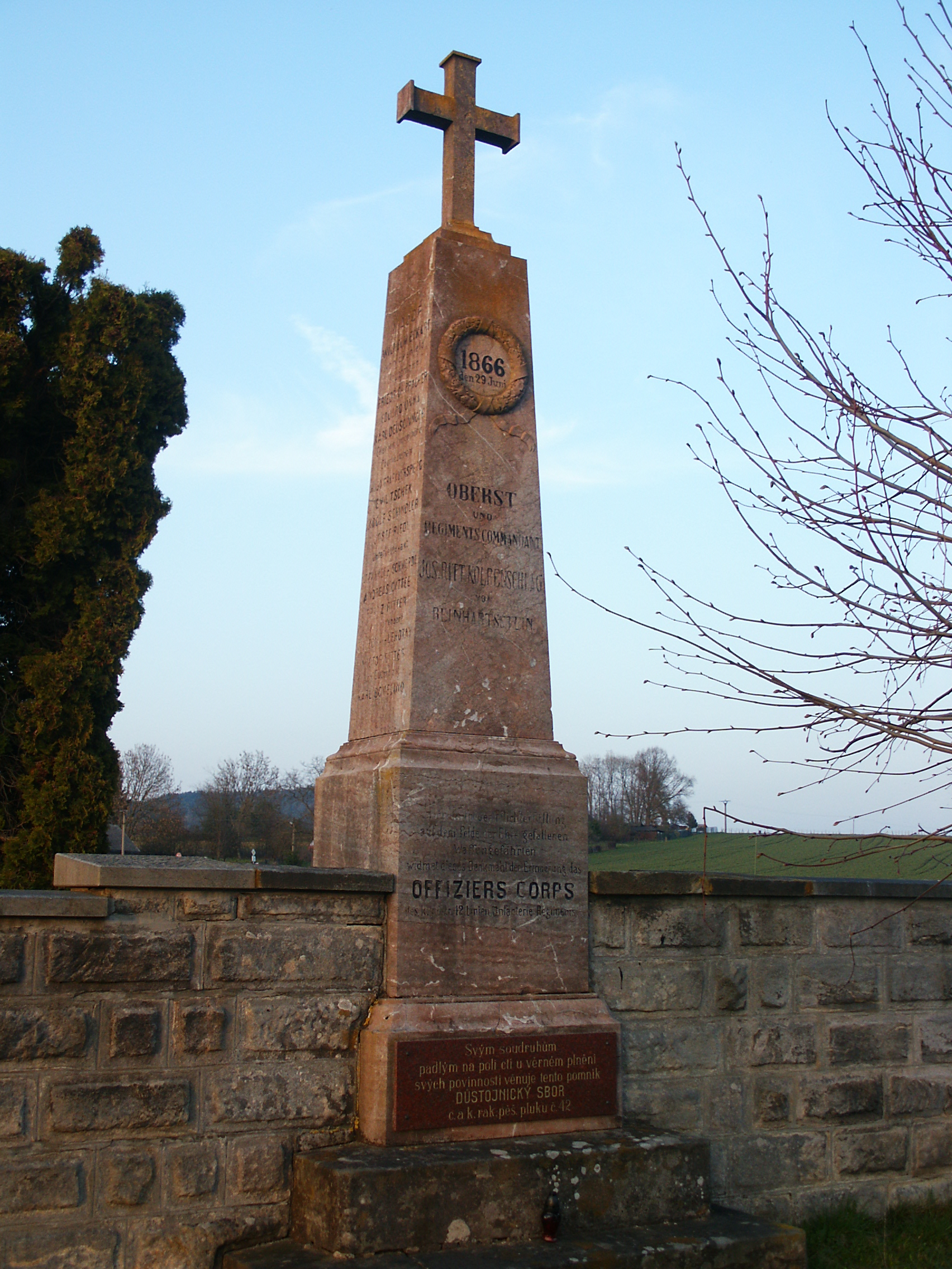 Horní Lochov - pomník rakouským vojákům padlým v bitvě u Jičína (42.pluk)